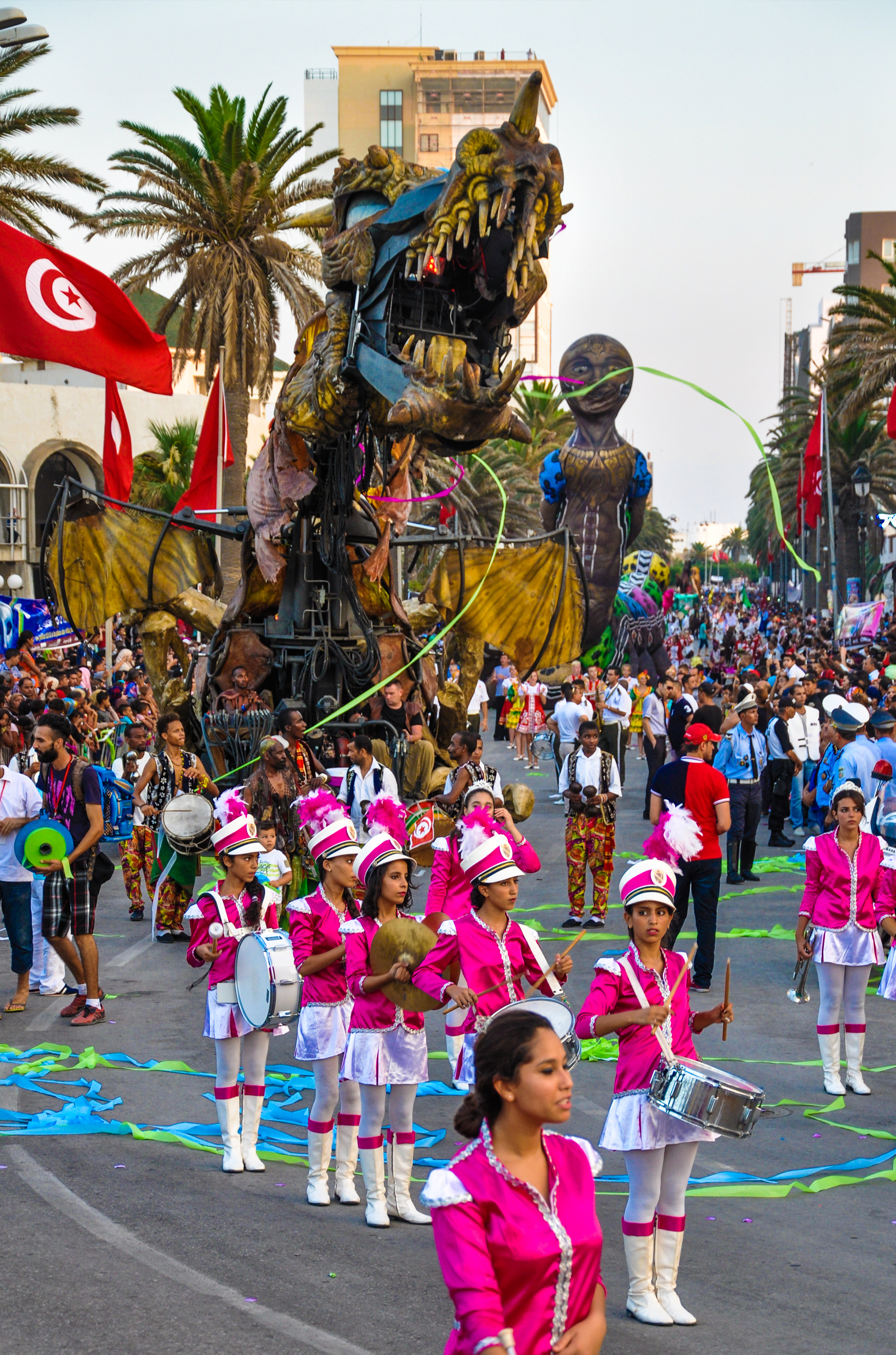 Festival d'Aoussou a sousse Tunis This is an image from Tunisia